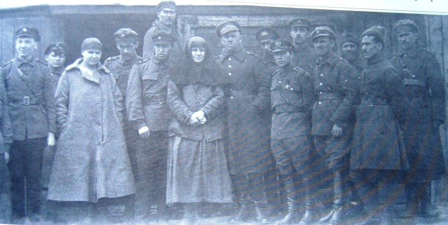 Группа чинов морской пехоты армии УНР, интернированных в польских лагерях, 1919-20 г.